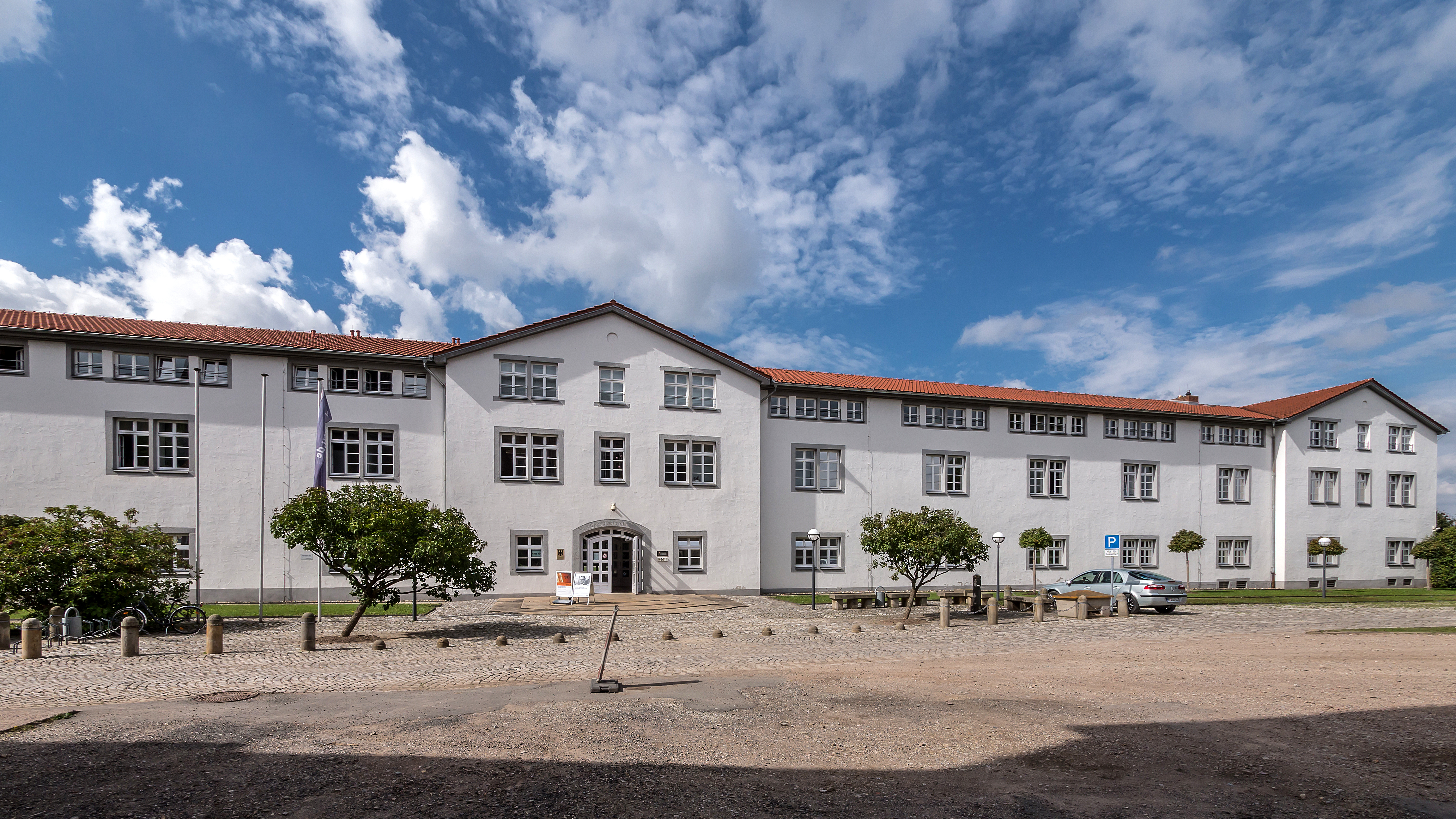 Erfurt-Altstadt Zitadelle Petersberg Untere Kaserne/Kaserne 3